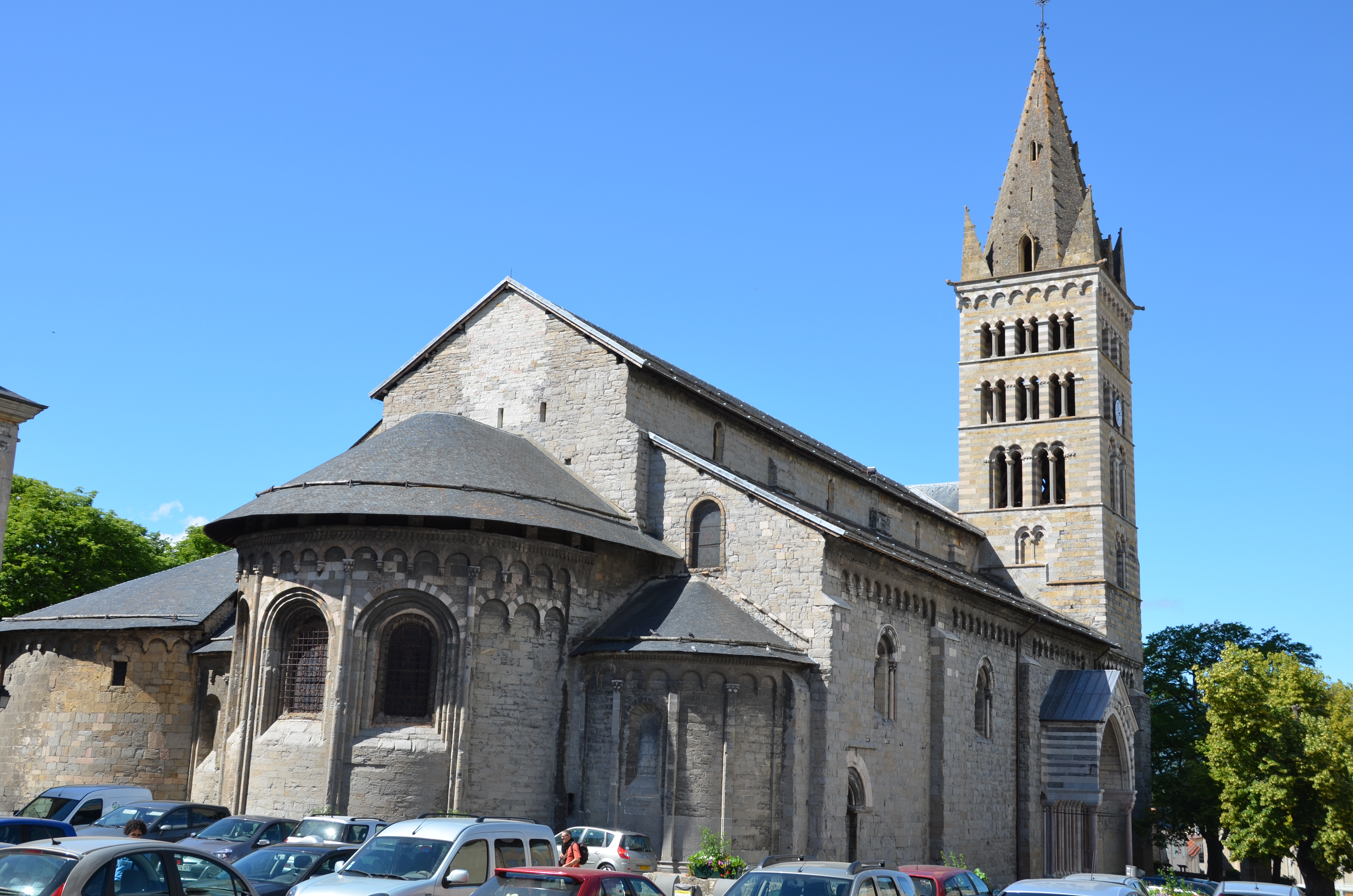 Catedral d'Embrun - General